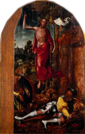 Este painel, juntamente com a "Adoração dos Pastores" (ME 1520) e o "Calvário" (ME 1522), formava o conjunto pintado por Gregório Lopes, em 1544,para os três altares da Igreja do Bom Jesus de Valverde, por encomenda do Cardeal D. Henrique. Dentro da igreja este painel ficava no altar do lado do Evangelho, o "Calvário" no altar principal e a "Adoração dos Pastores"no lado da Epístola pois os painéis distribuiam-se segundo uma sequência narrativa adequada à circulação interna do espaço que, tratando-se de uma planta de cruz grega formada por quatro octógonos dispostos simetricamente em volta de um octógono central e com a entrada pelo octógono fronteiro ao do altar-mor, mas por uma abertura lateral, se faz no sentido da direita para a esquerda e não pelo sentido inverso, como é mais usuall. Por despacho de Maio de 1929, do Ministro da Instrução, o Director da Escola Regional de Agricultura entrega os quadros ao Museu de Évora a 13 de Junho desse ano.